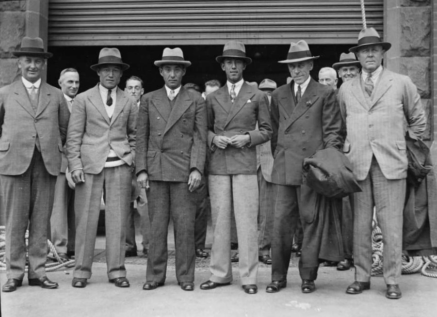 テニス全豪オープンに出場した日本選手。中央左より佐藤次郎、原田武一、布井良助。1932年、シドニー